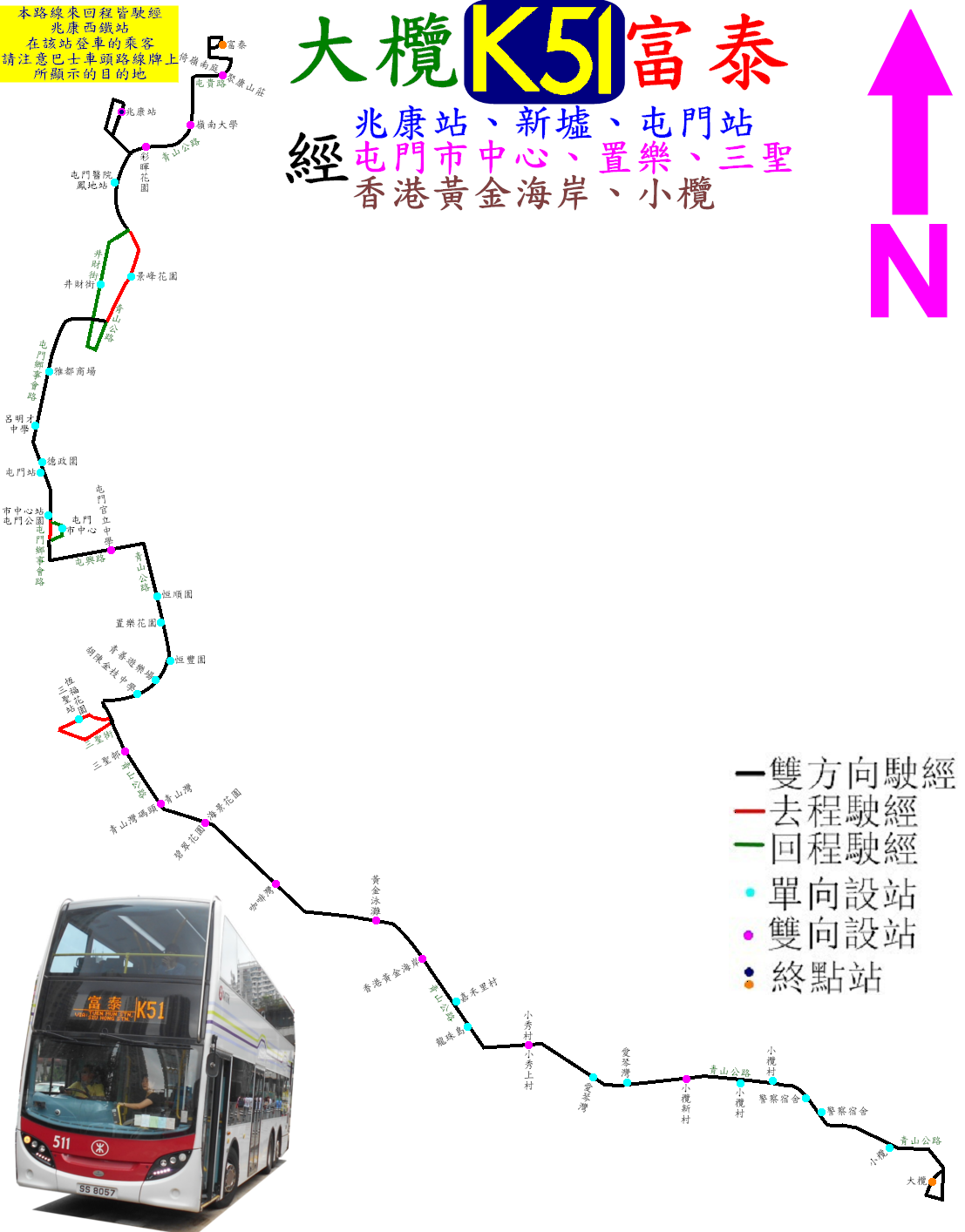 中文（香港）: 港鐵巴士K51線的走線圖(2016年4月)